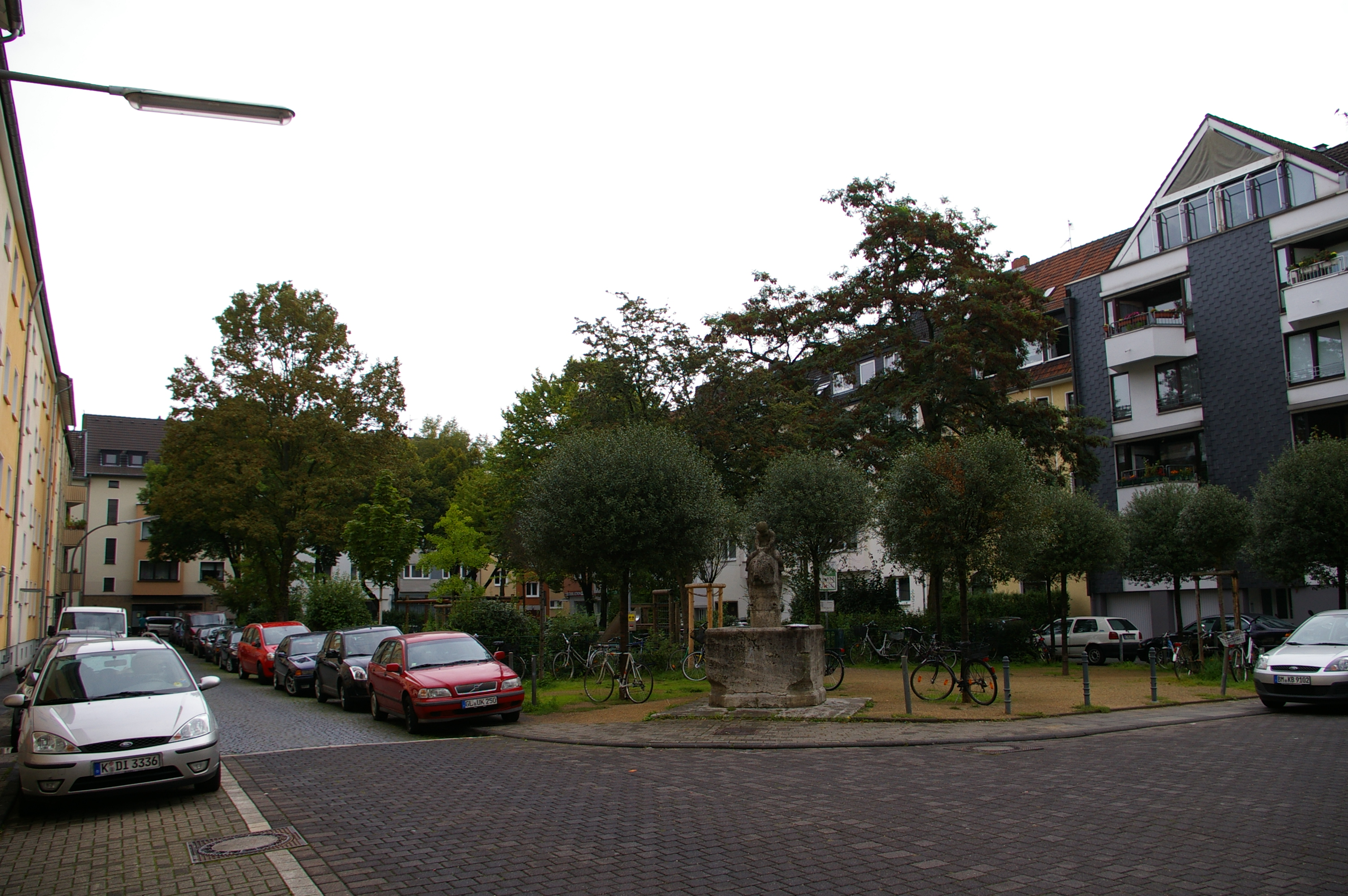 Cologne-Zollstock, Spielplatz, Brunnen, Parkanlage, Theophanoplatz